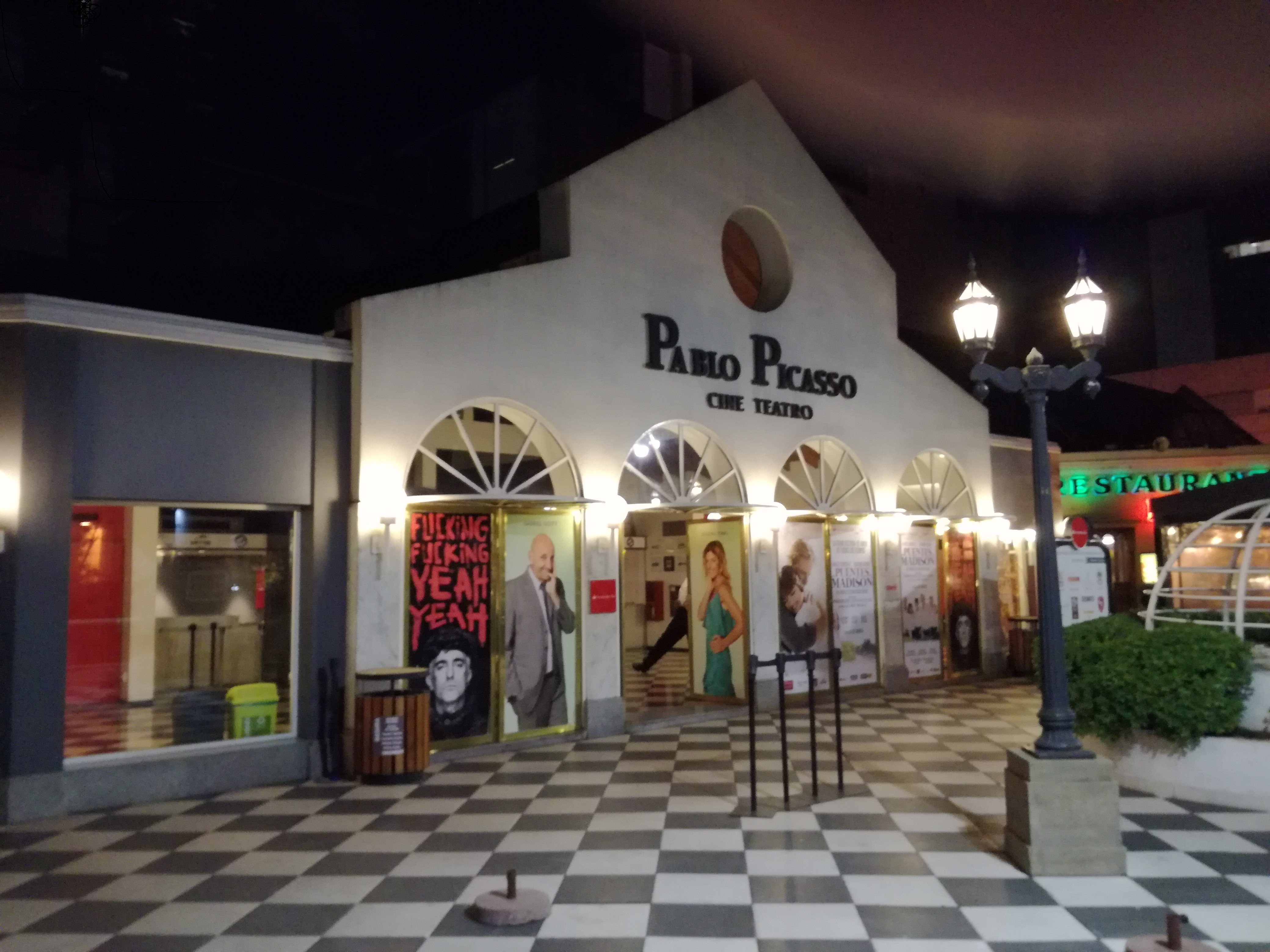 Sala Pablo Picaso, en el Paseo La Plaza, Av. Corrientes. Buenos Aires